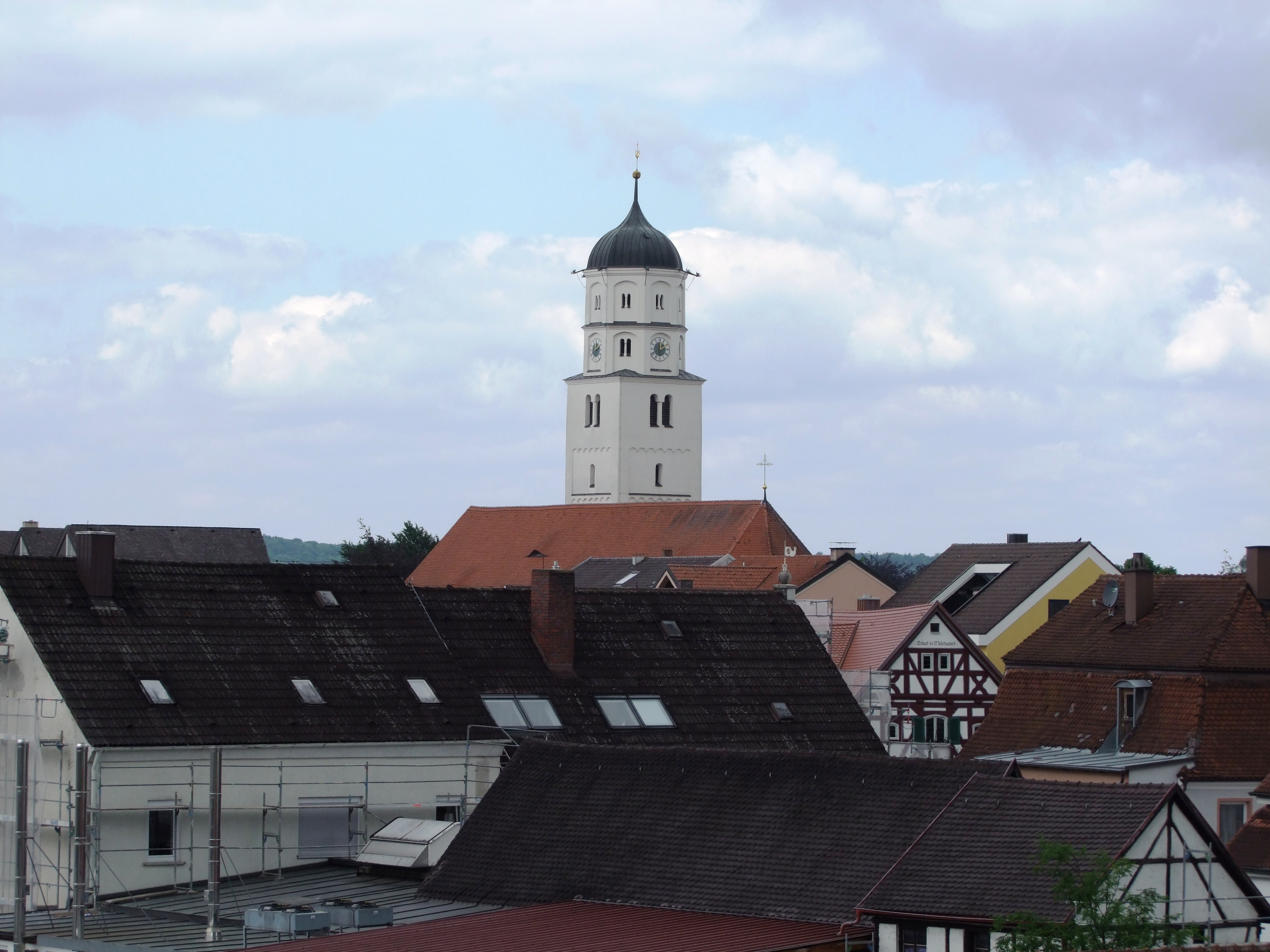 Gesamtansicht der Kirche vom Schloßberg aus gesehen.